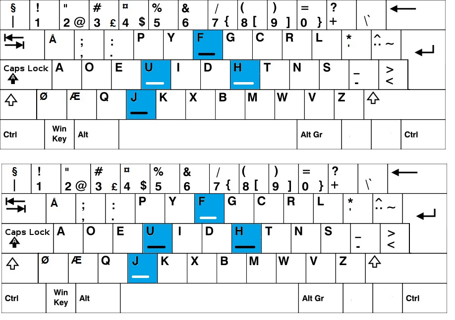 Viser manglende fingermerker og feil fingermerker når man gjør om et tastatur fra qwerty til dvorak (øverste tastaturet), og hvordan fingermerker på et originalt dvorak-tastatur skal se ut (nederste tastaturet)